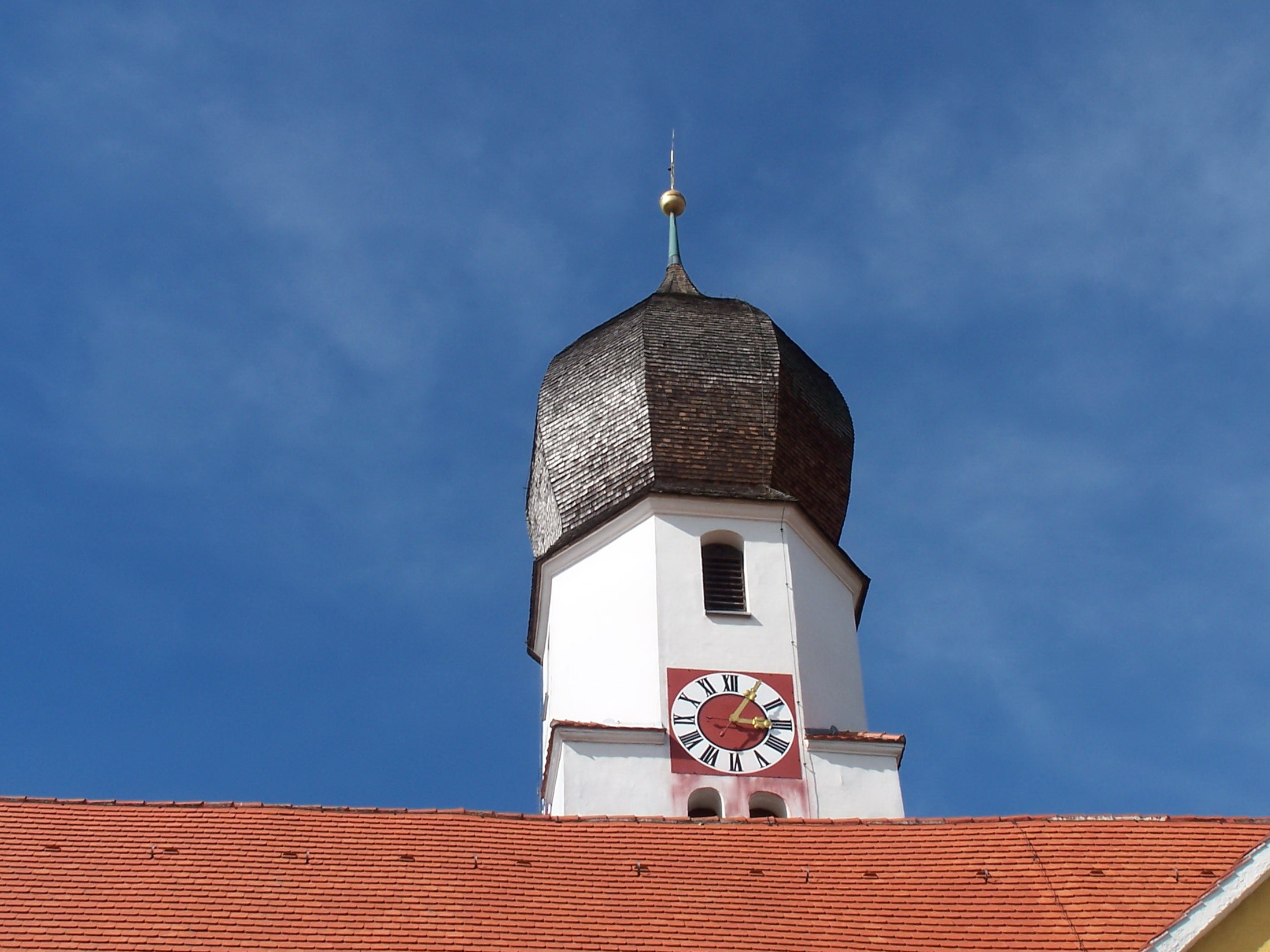 Sandsbach, Am Kirchberg 3; Am Kirchberg 2. Katholische Pfarrkirche St. Petrus. Turm mit quadratischem Unterbau und achtseitigem Aufsatz mit Zwiebelkuppel.